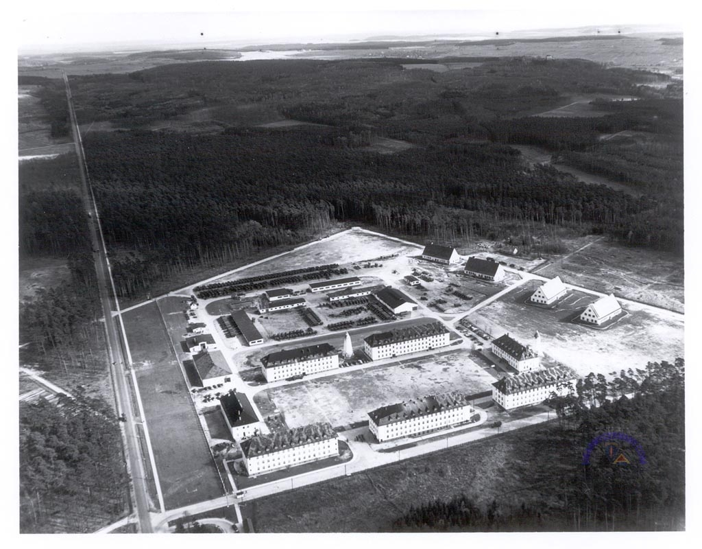 Verdun-Kaserne in Giessen (Rivers-Barracks)